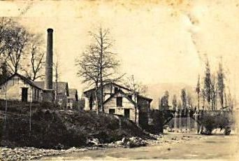 Engomer (Ariège, France) - Papeteries Léon Martin, vue aval.